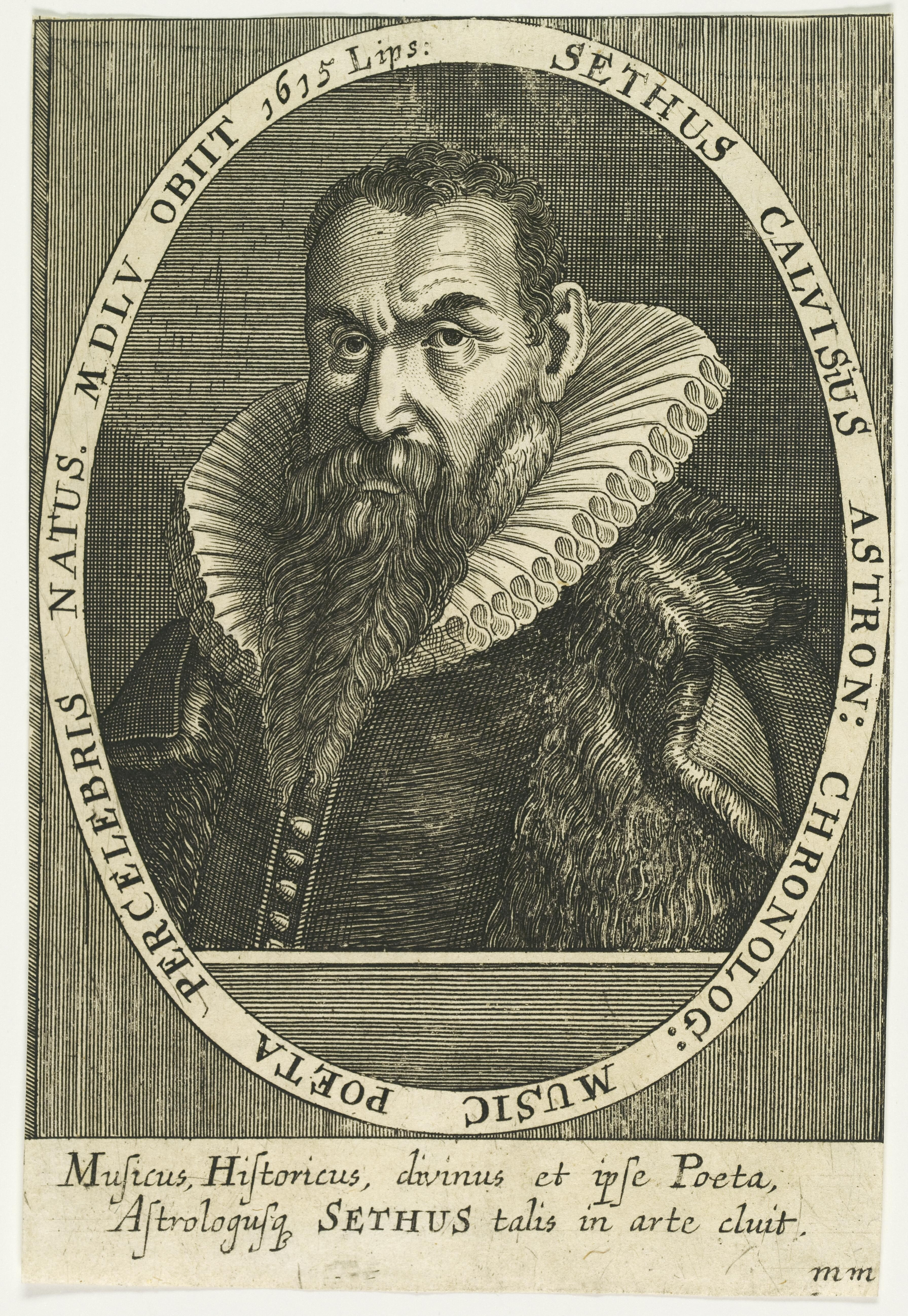 Sethus Calvisius (eigentlich: Seth Kalwitz, * 21. Februar 1556 in Gorsleben im Kyffhäuserkreis; † 24. November 1615 in Leipzig) war Komponist, Musiktheoretiker und Kantor in Schulpforte und Leipzig